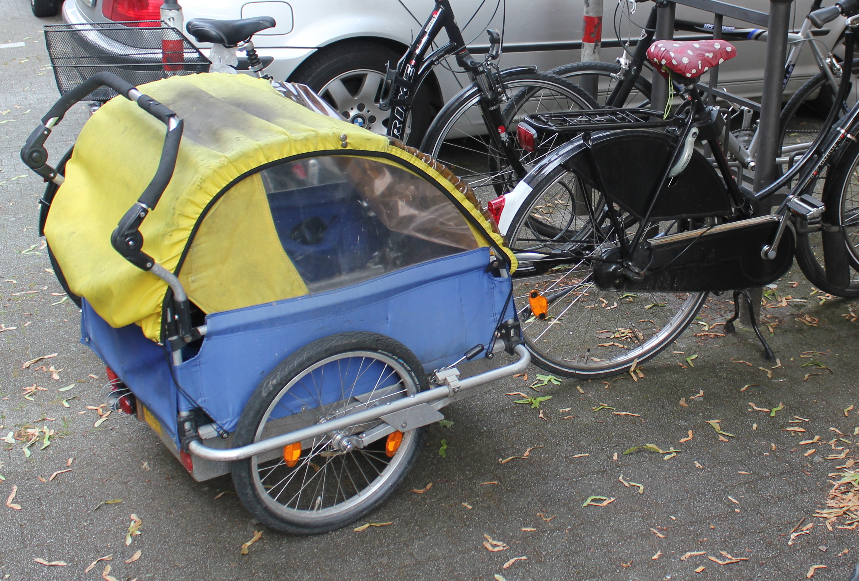 bicicleta amb remolc per a transport de passatgers a Karlsruhe